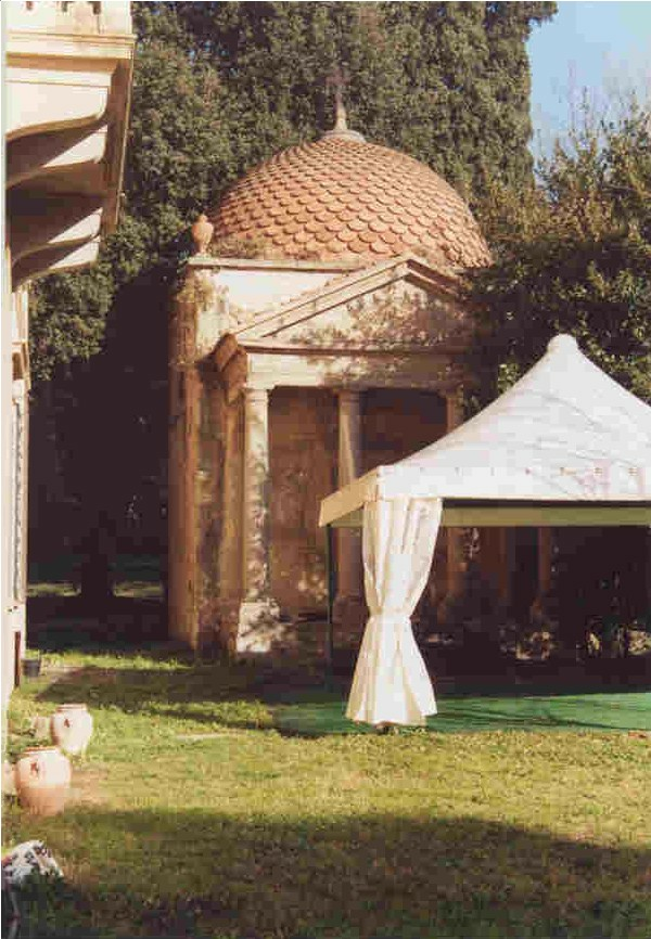 Cappella di Villa Fabbricotti, Firenze